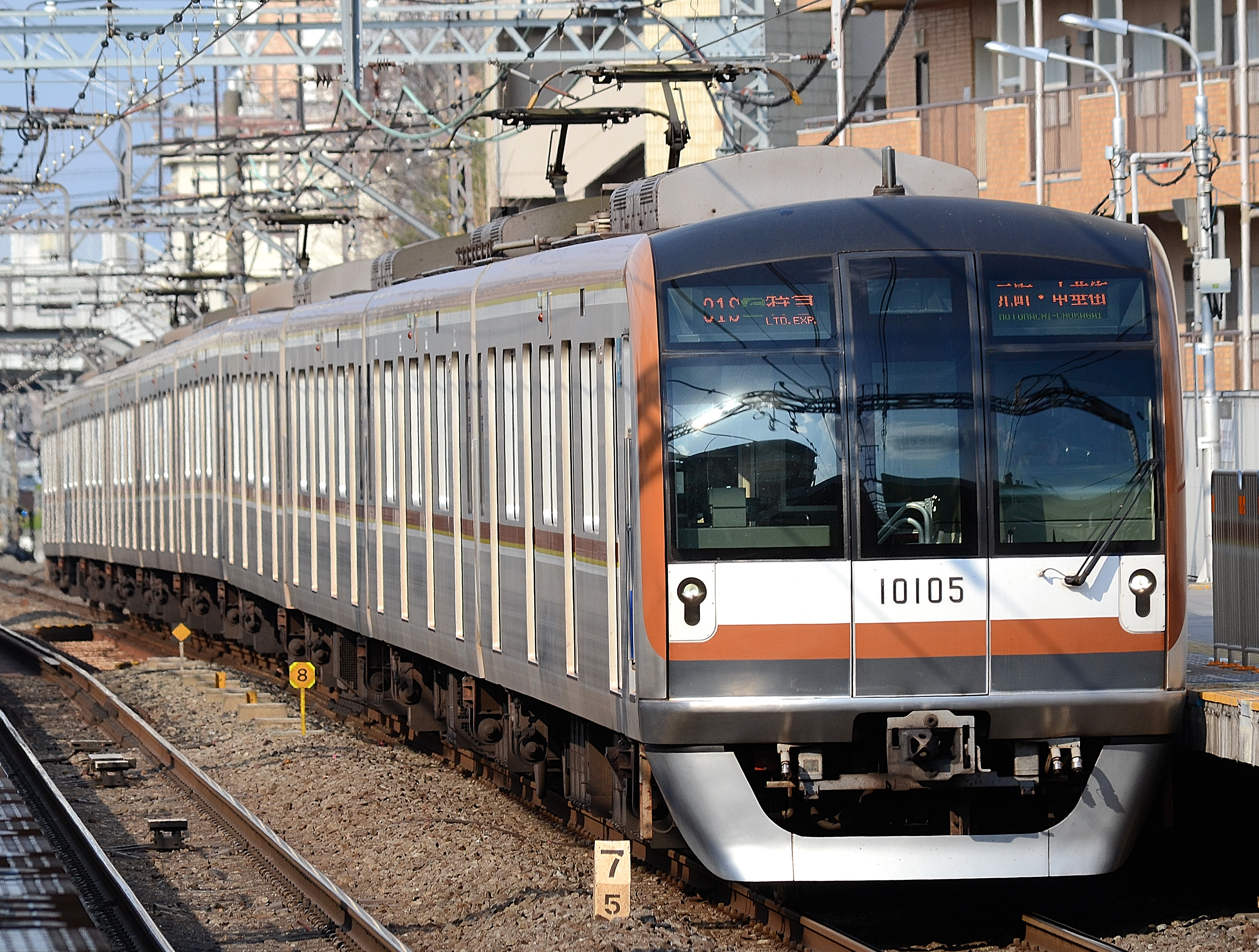 東横線、都立大学駅を通過する東京メトロ10000系によるF特急｢元町・中華街」行き